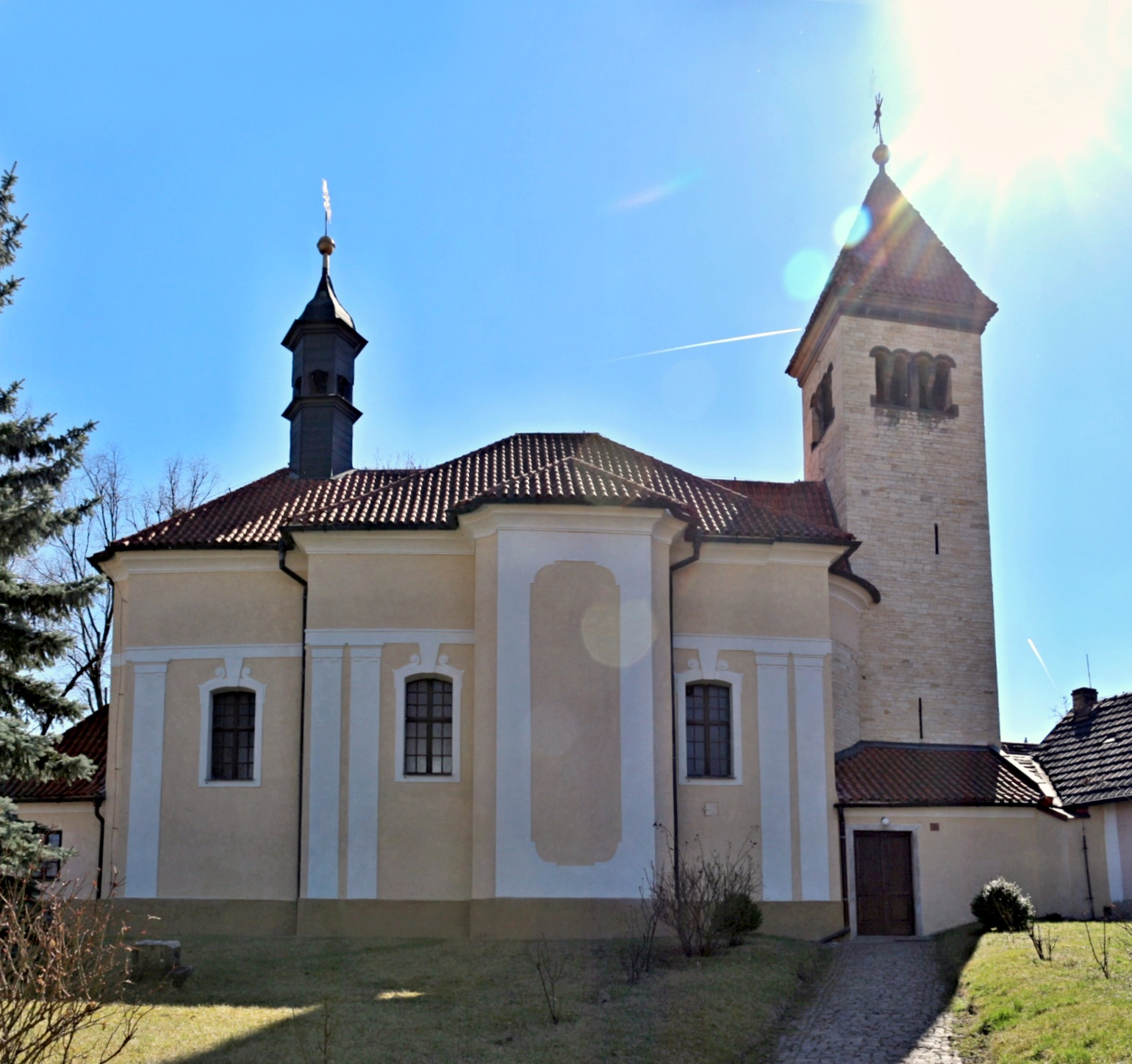 Kostel svatých Petra a Pavla v Řeporyjích